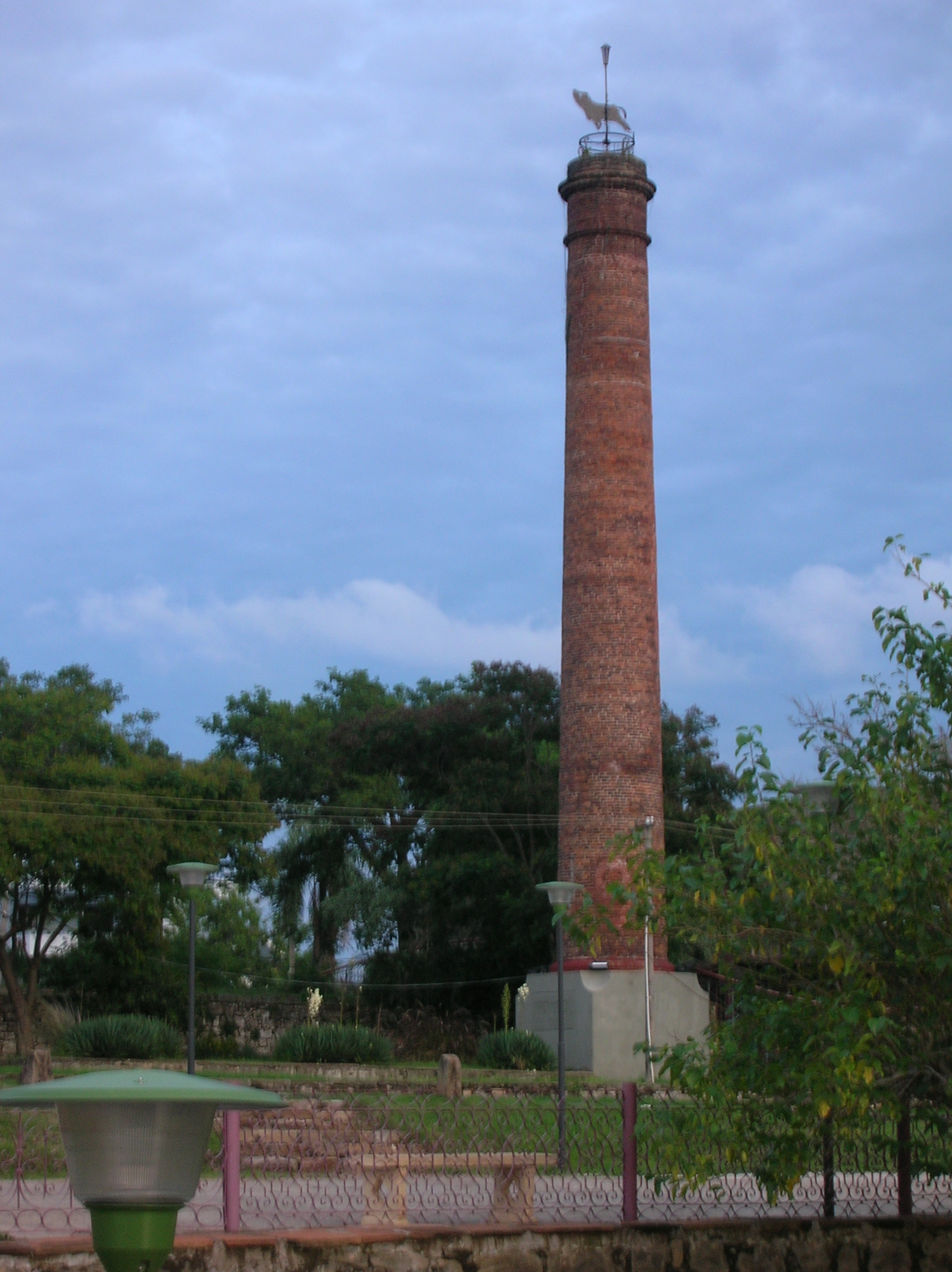 Chimenea de un Saladero en la costanera de Salto.